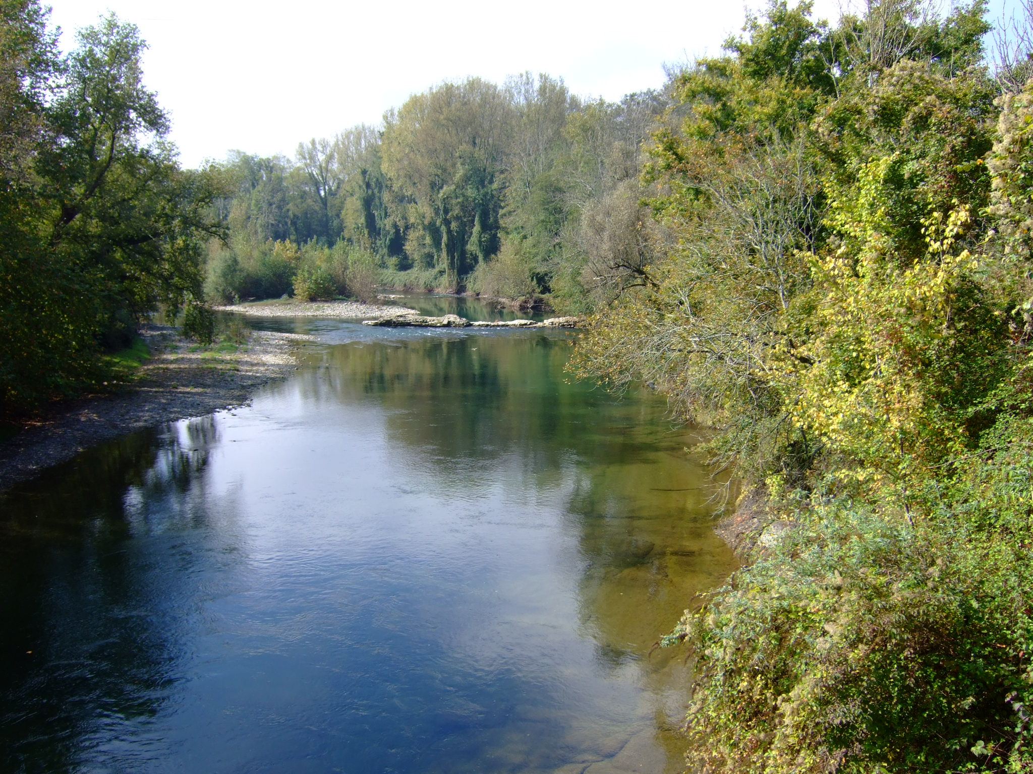 Le Saison depuis le pont entre Charre et Lichos.